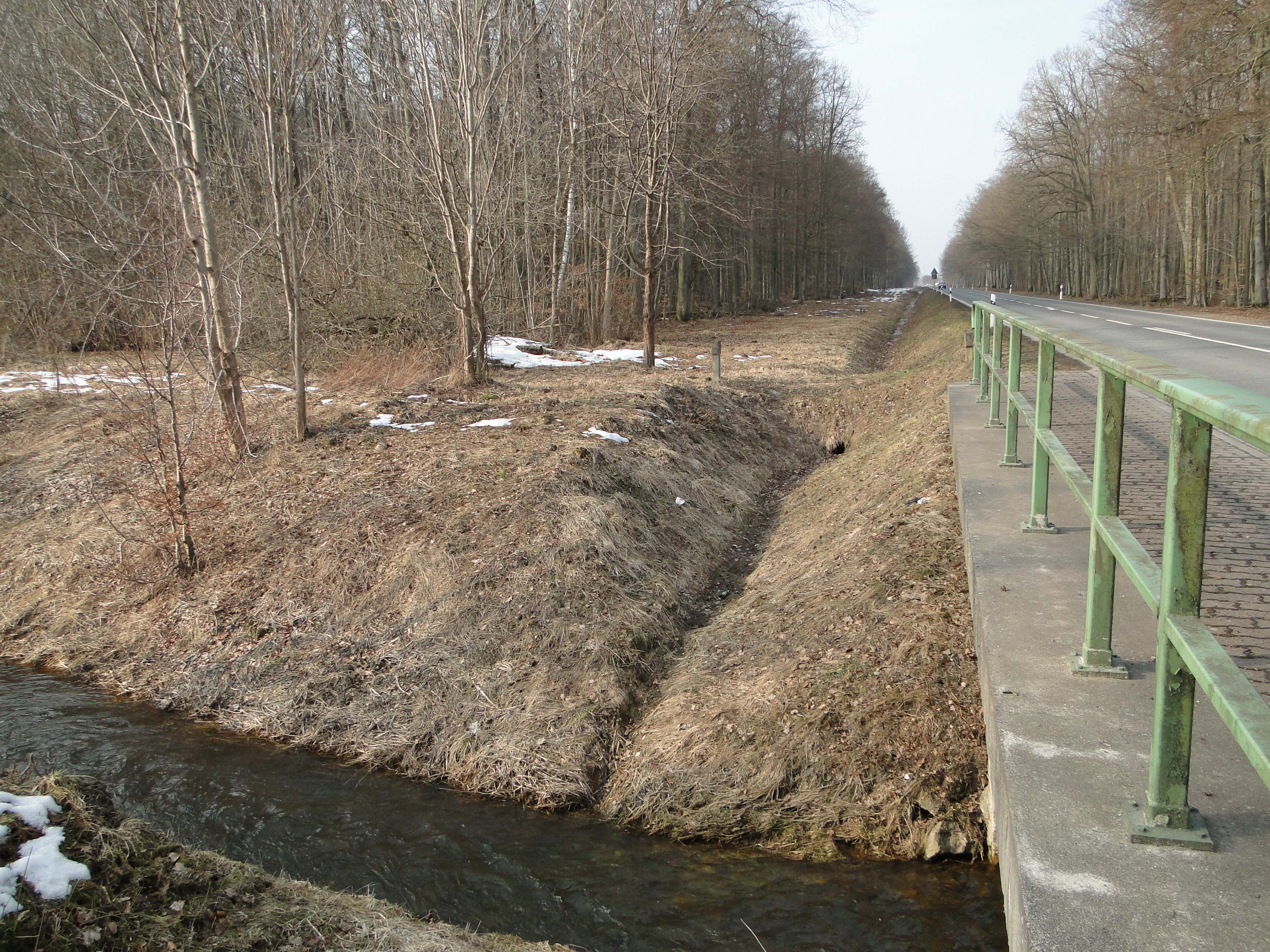 Naturschutzgebiet Abtshagen, Mecklenburg-Vorpommern. - OpenStreetMap(Info)